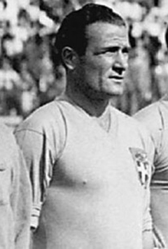 Luisito Monti con la maglia dell'Italia